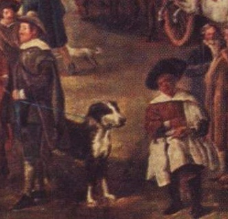 detail with dog